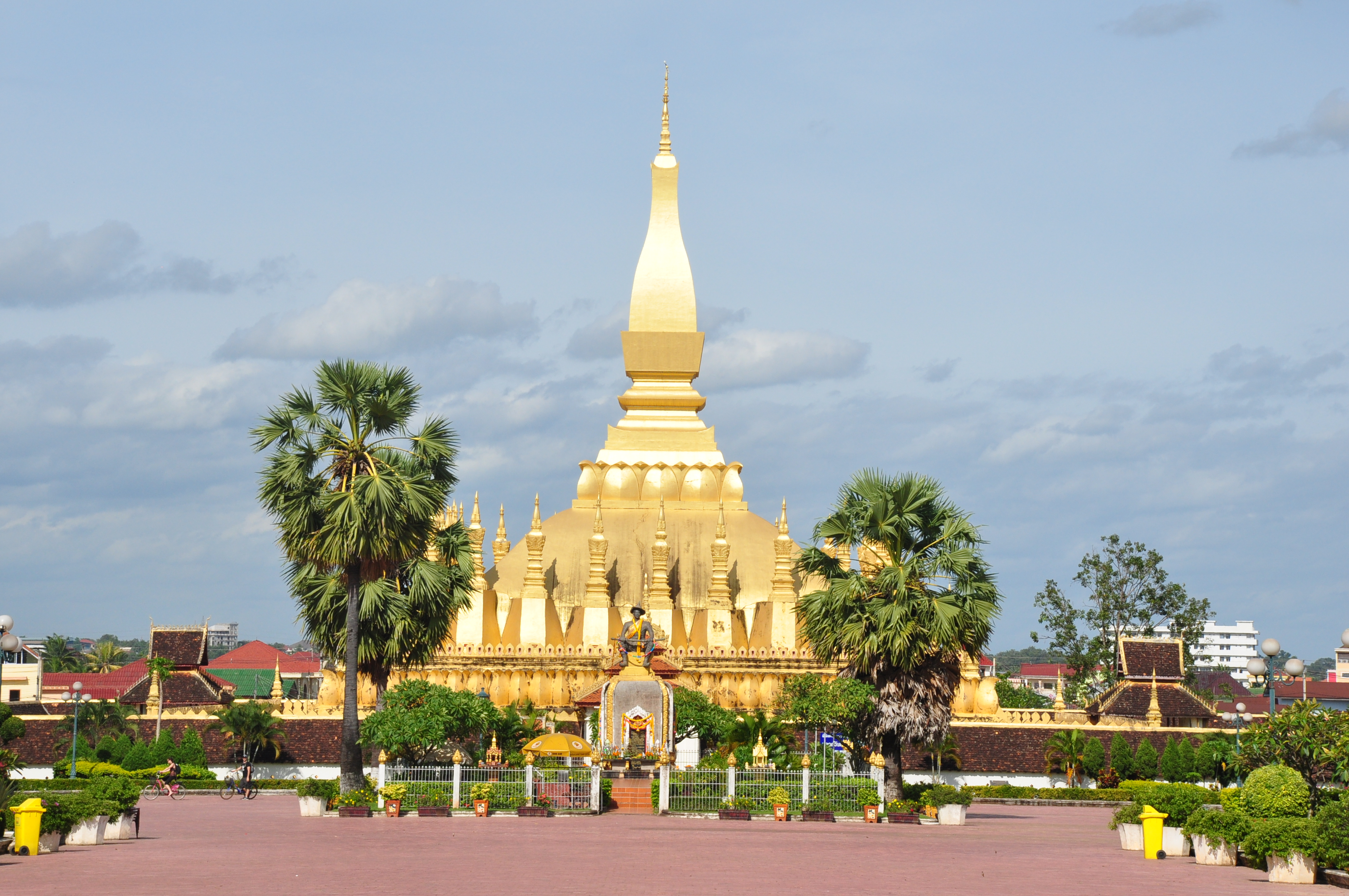 Estupa That Luang, Vientián, Laos